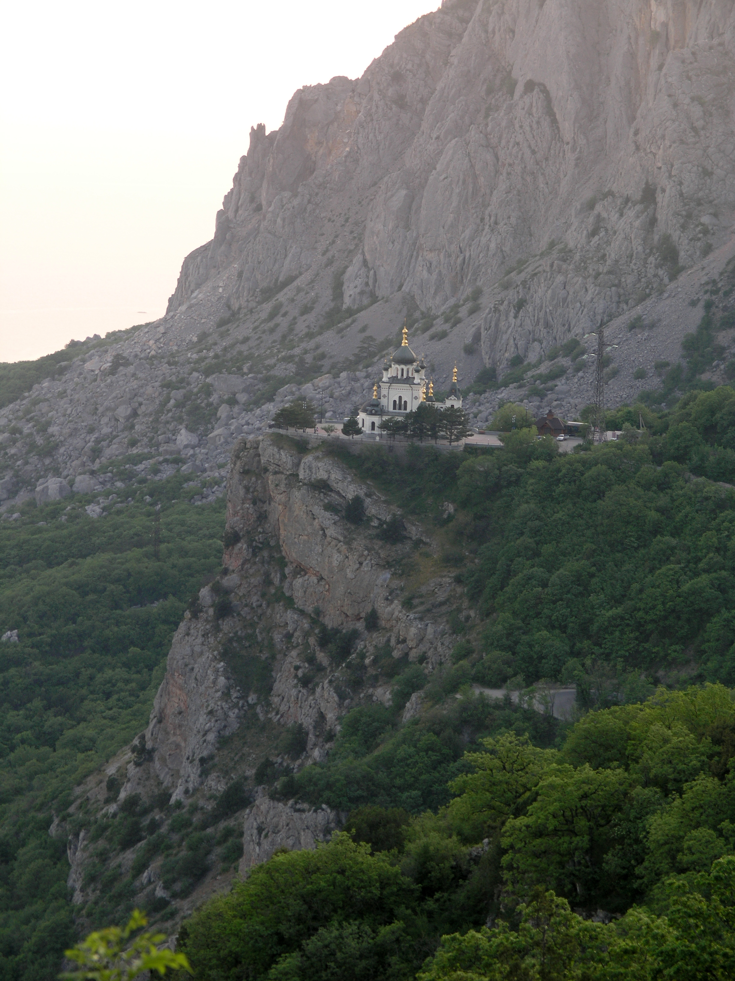 Крим, Форос - Церква Воскресіння Христового